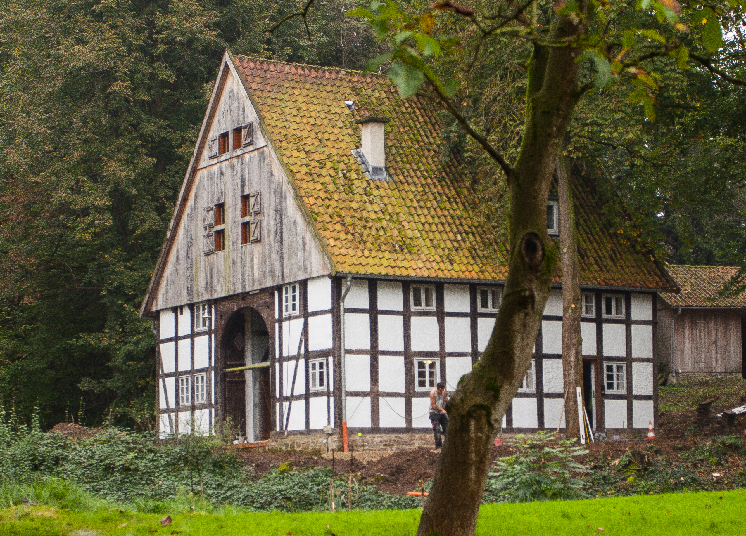 Lemgo, Papiernbentrup 55This is a photograph of an architectural monument., no. 0